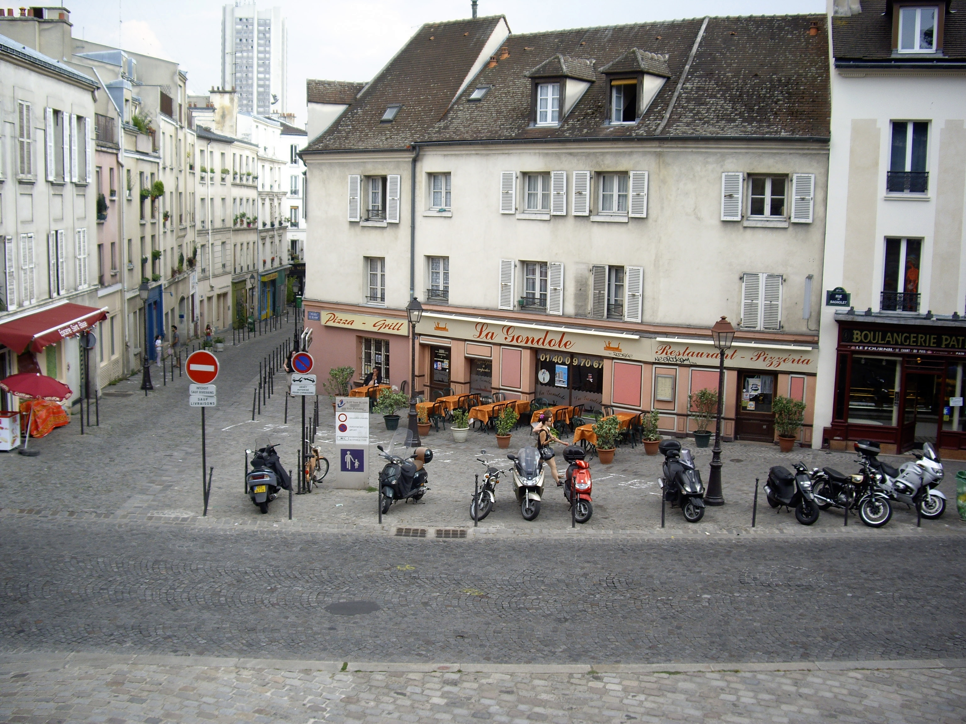 Place Saint-Blaise, vue prise depuis la rue de Bagnolet (n° 118, en face à droite) à hauteur de l'église Saint-Germain-de-Charonne en direction de l'enfilade de la rue Saint-Blaise (1-13, à gauche), XXe arrondissement, Paris, France.